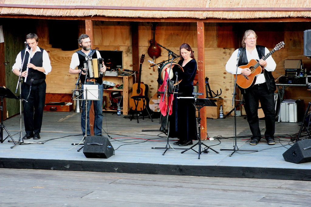 Die Folkgruppe Laway aus Ost-Friesland bei einer Aufführung des Freilichtheaterstücks "Dusend Dalers" in Oldersum im Jahr 2006. De Folkmusik-Koppel Laway ut Oost-Freesland bi en Upföhren van dat Freeilücht-Theaterspööl "Dusend Dalers" in Ollersum in`t Jahr 2006.